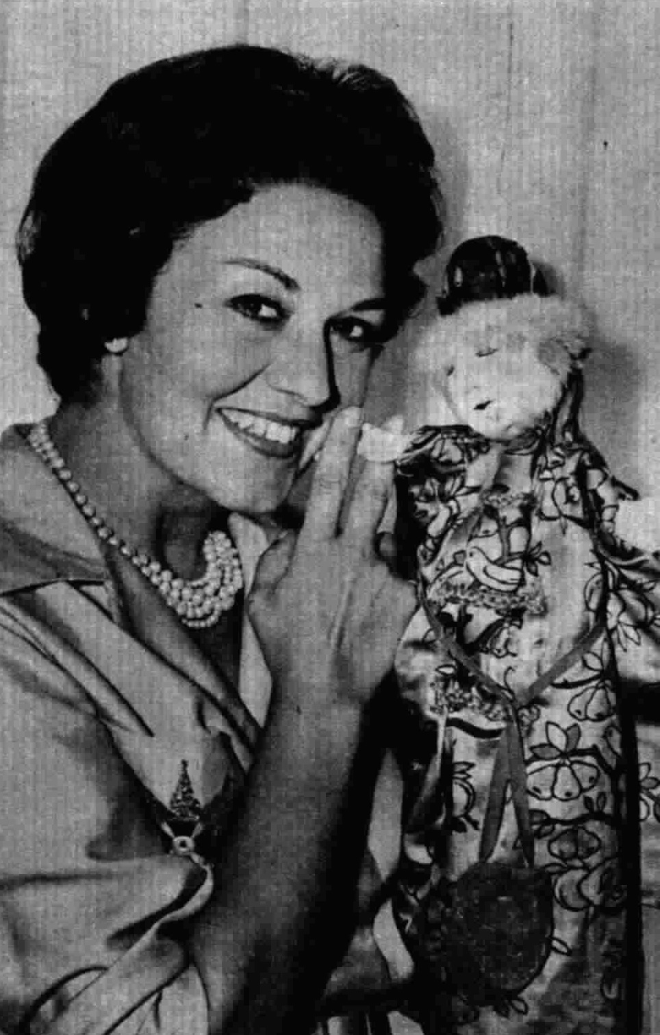 Italian presenter Elda Lanza